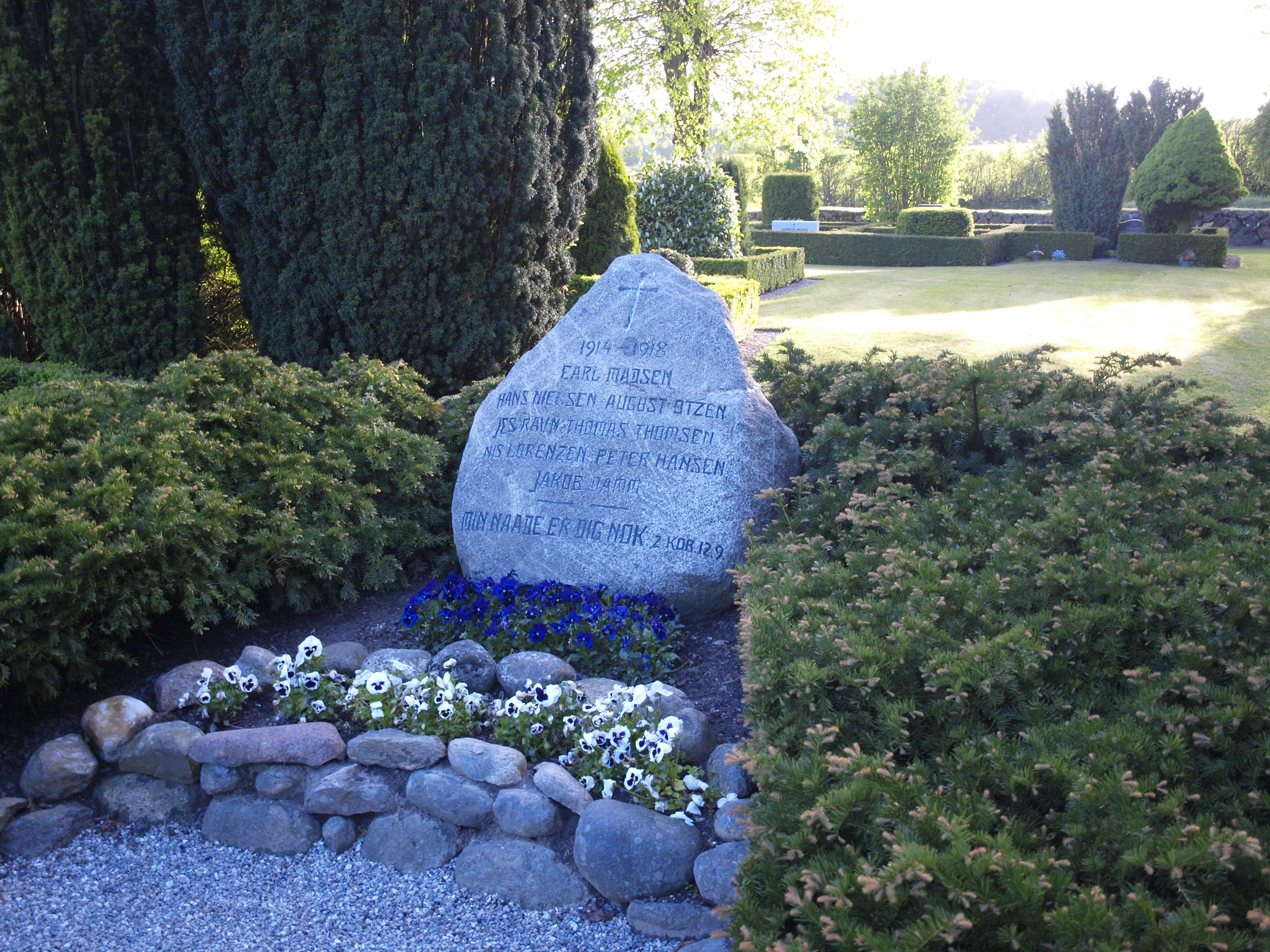 Mindesten over faldne fra 1. verdenskrig, Bjerning Kirke